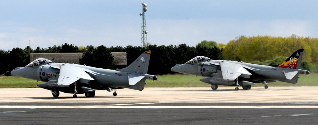 British Aerospace Harrier II GR7